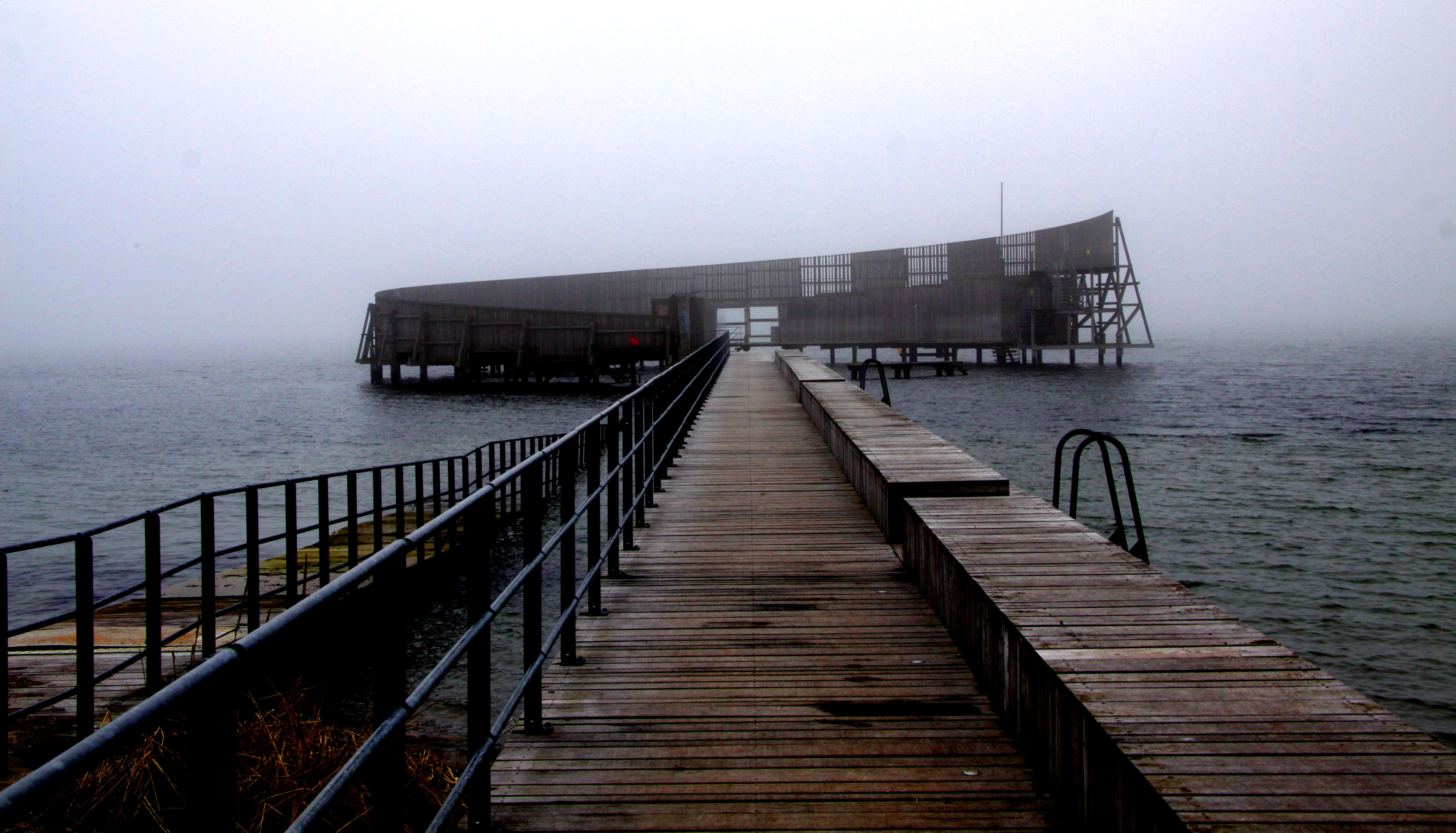 Kastrup. Søbadet.